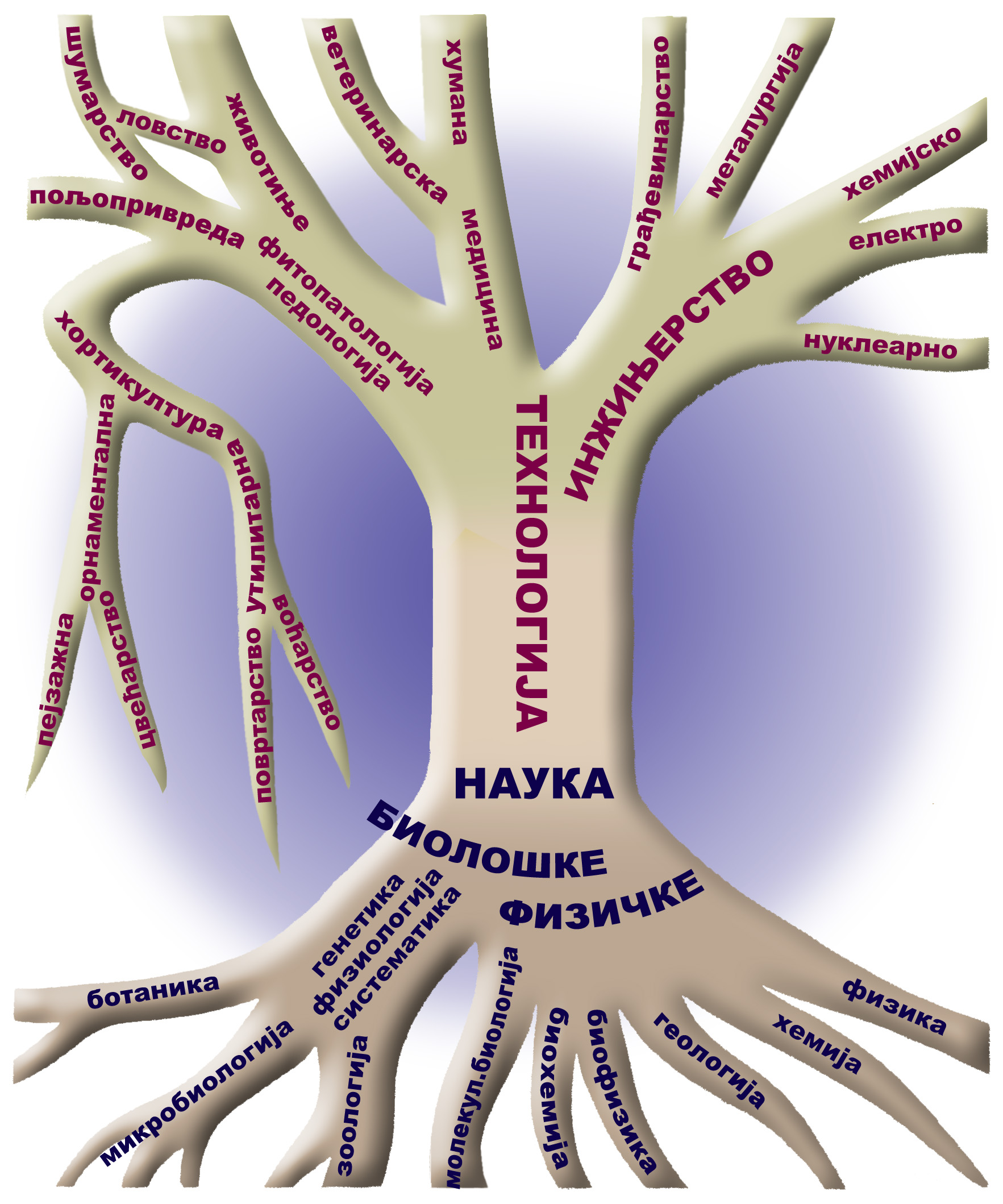 Stablo prirodnih nauka i tehnologija Janick (modifikovana šema: Mihailo Grbić)